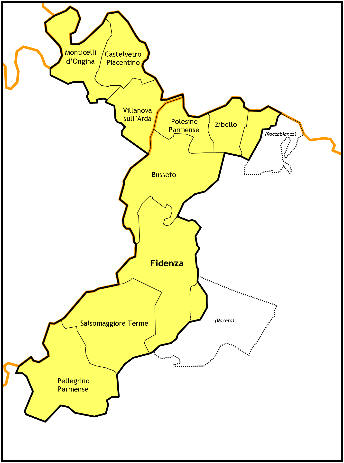 Mappa della Diocesi di Fidenza